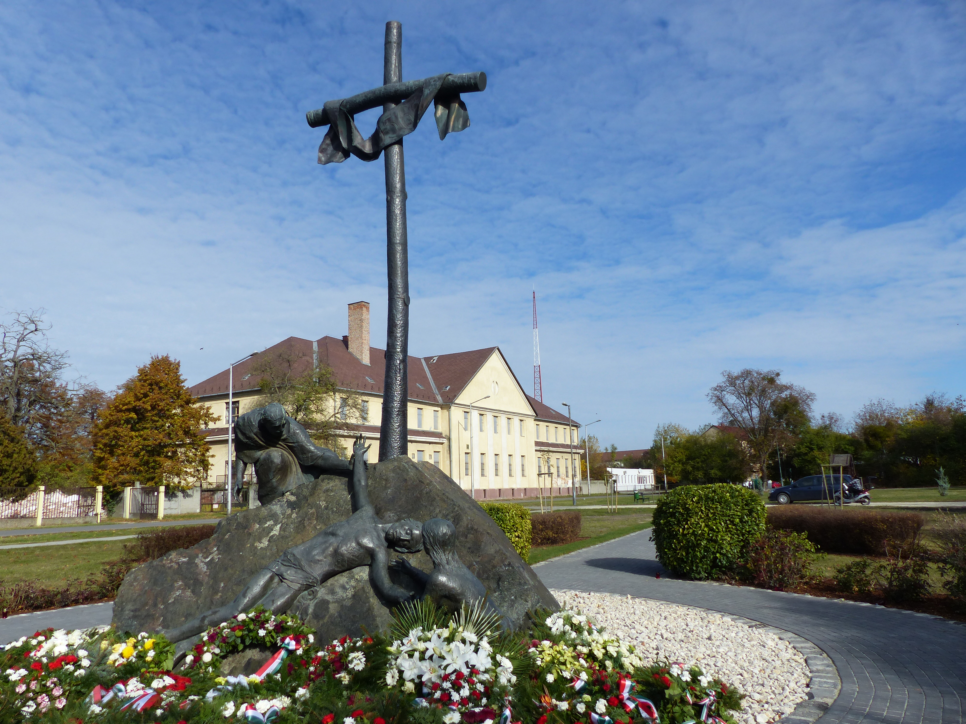 1956-os emlékmű. A felvétel 2016. október 31-én készült Mosonmagyaróváron, a Gyász téren. 1956 október 26-án az ÁVH határőr laktanya előtti tömegbe lőttek az ÁVH-sok. Az ismételt sortűz a menekülők hátát érte. A tömeggyilkosságban a visszaemlékezők szerint 104-en haltak meg. A laktanya parancsnoka Dudás István (Abádszalók 1924 augusztus 20 - Kiskunhalas, 2002 június 28) volt. Források: Böröndi Lajos: Dokumentumok 1956 - Mosonmagyaróvár Integratio, Bécs, 2006. (hozzáférés: 2016.10.31).